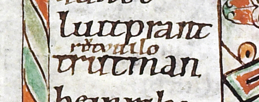 Dr Namme Rothwiil im Verbriäderungsbuech vu Sanngalle, ca. 12. Johrhundert - dr isch Routvuilo gschriibe (s v, wu iber s o ibergschriibe isch, liist mer u) - also Routwiilo. Dr Diphthong ou goht äntwäder uf dr Sannggallemer Schriiber zruck oder s het dertemol tatsächlig Routwiil gheiße (d Ändung o isch latiinisch).